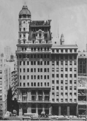 Vista del Railway Building desde el Edificio Libertador. Se ve a la derecha el edificio de la Compañía General de Industrias y Transportes y en el borde derecho la construcción de la 2° etapa del Palacio de Hacienda, realizada entre 1949 y 1950.